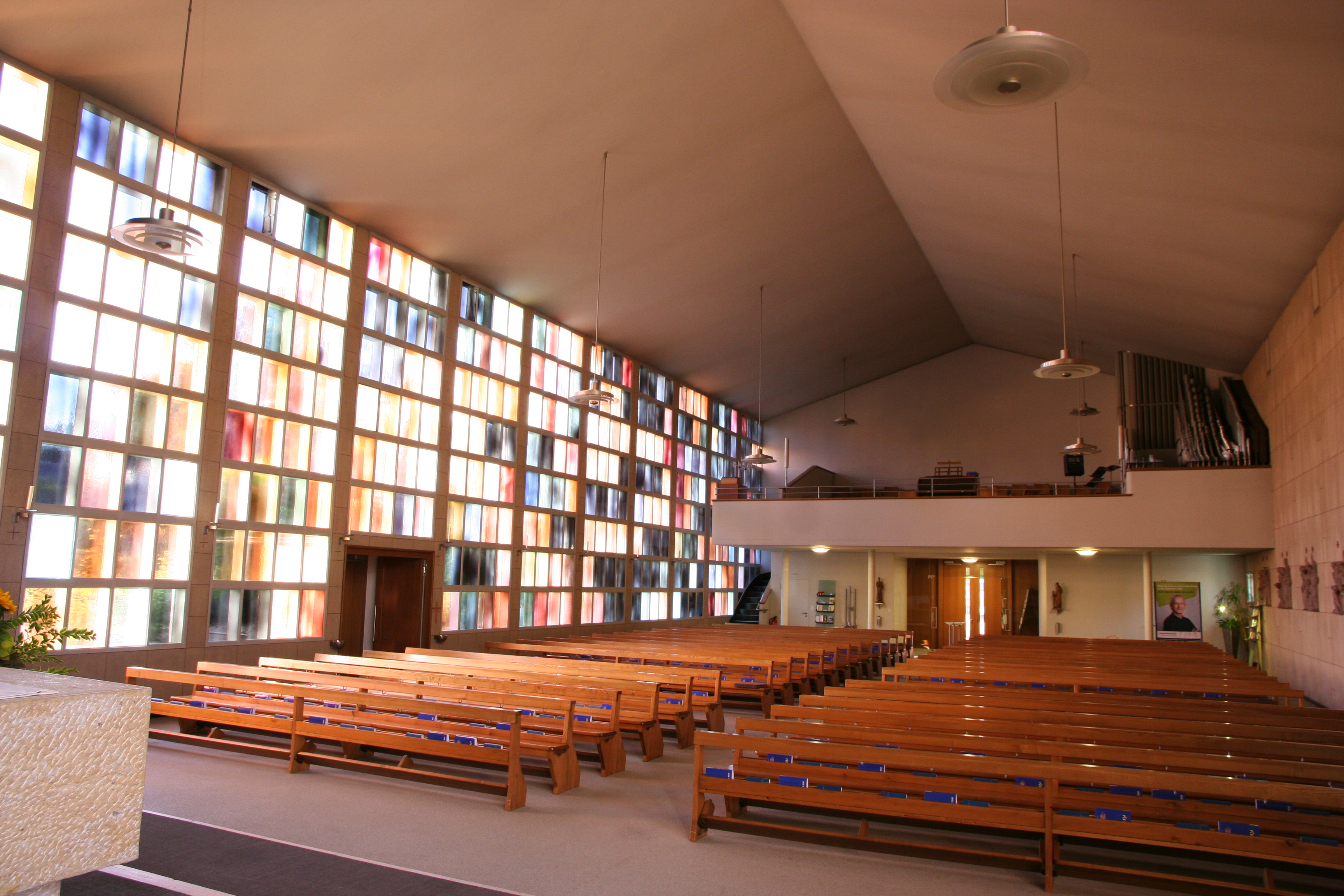 Römisch-katholische Pfarrkirche St. Gallus Oberuzwil